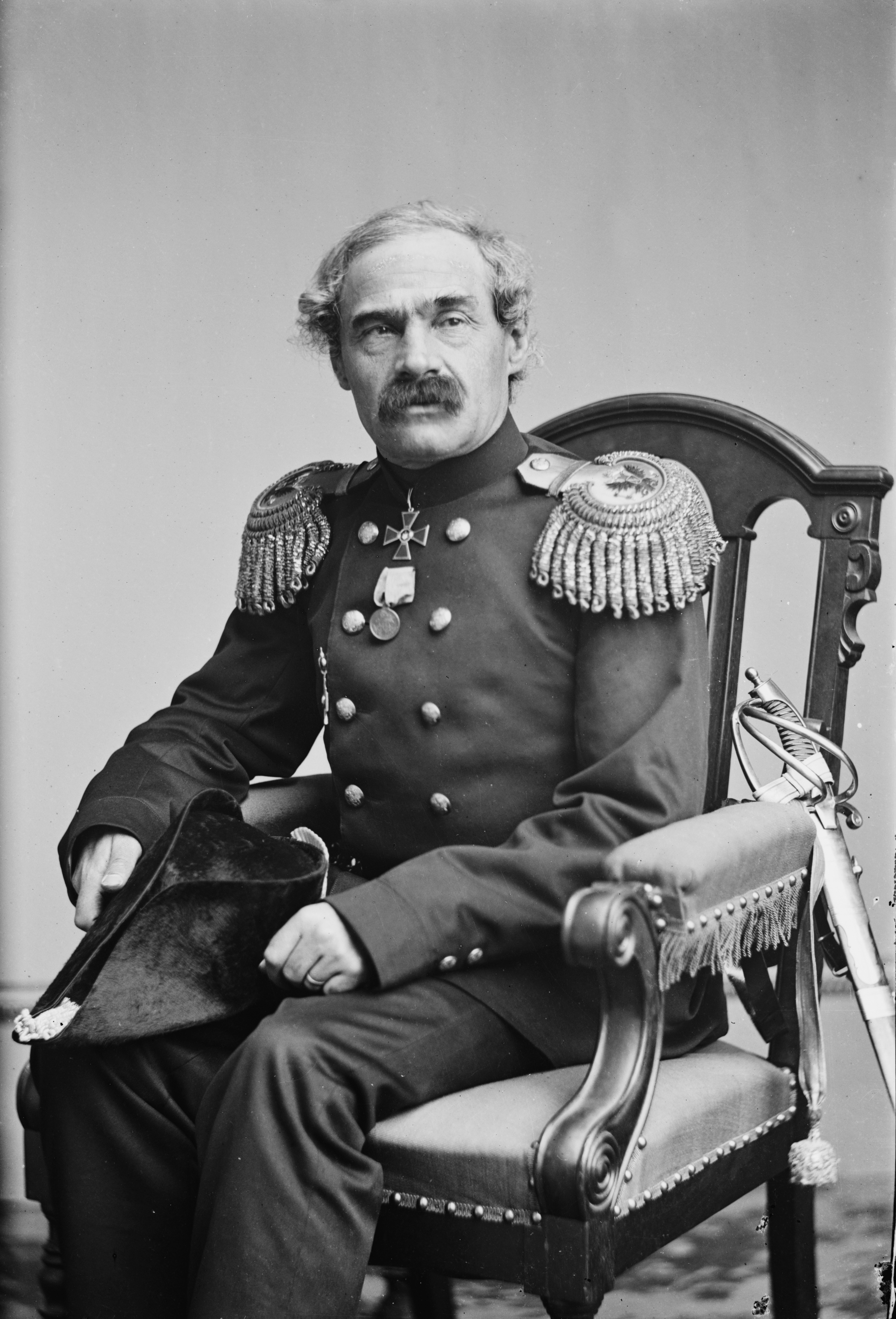 TITLE: Russian Adm. Adm. Lisovski, Лесовский, Степан Степанович, Lesovskii, Stepan Stepanovich